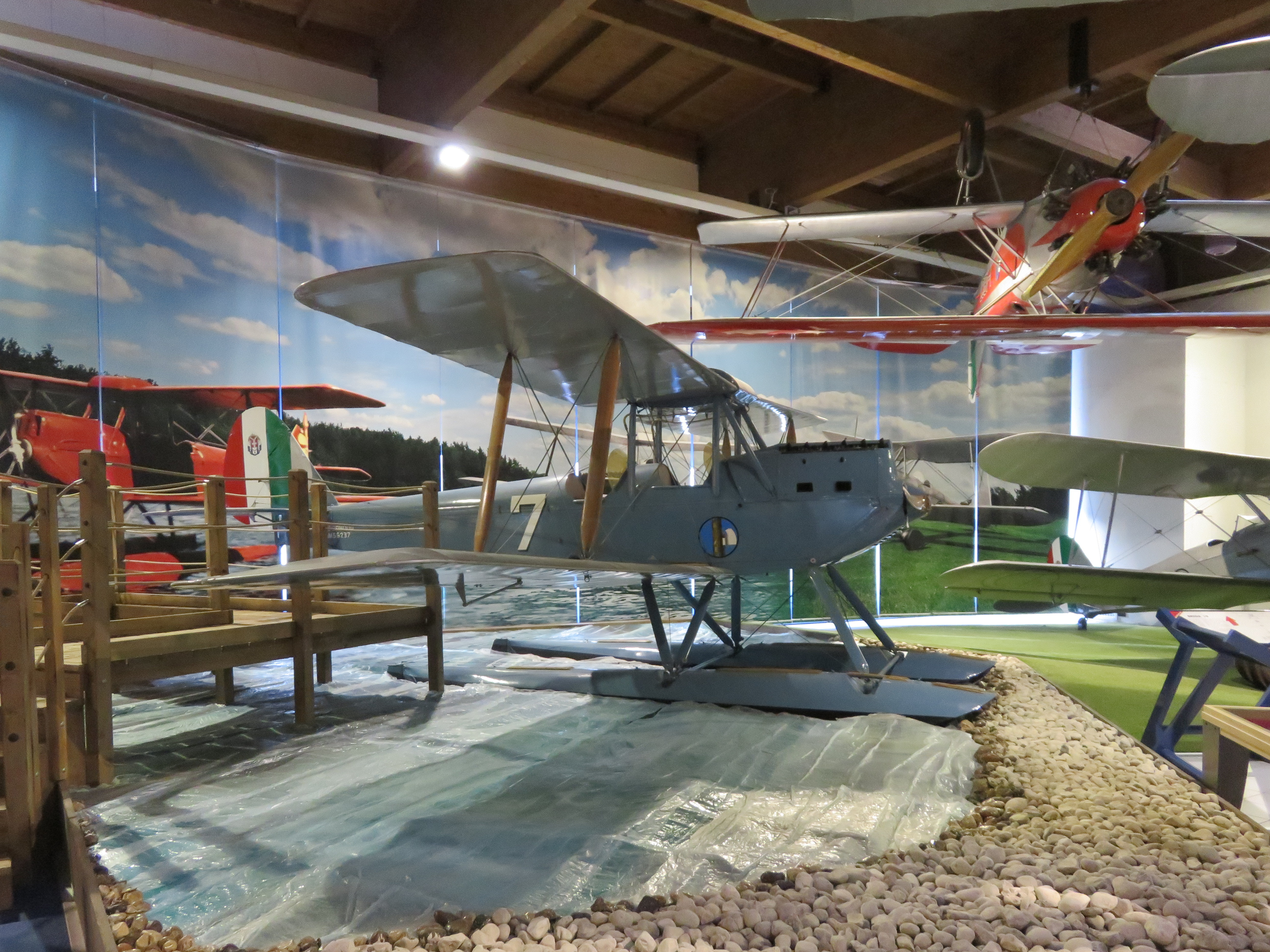 Parte della sala